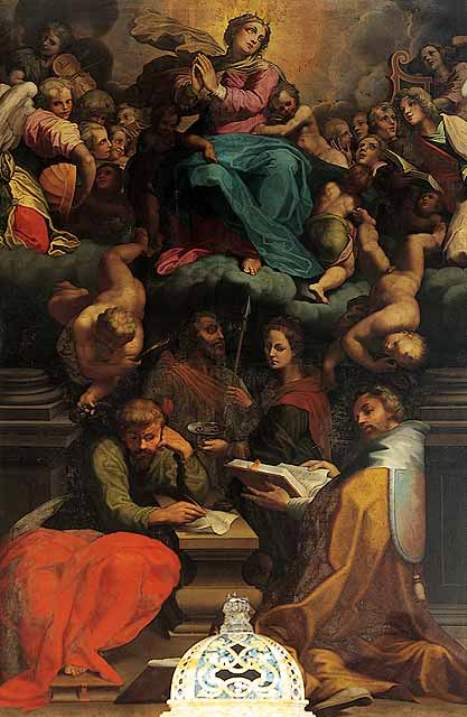 L'Assunzione della Vergine, pala d'altare di Giovanni Battista Tinti (1558-1604) nel Duomo di Parma.